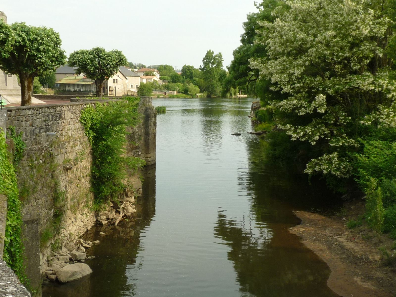 Confluent du Goire et de la Vienne à Confolens (Charente, France)